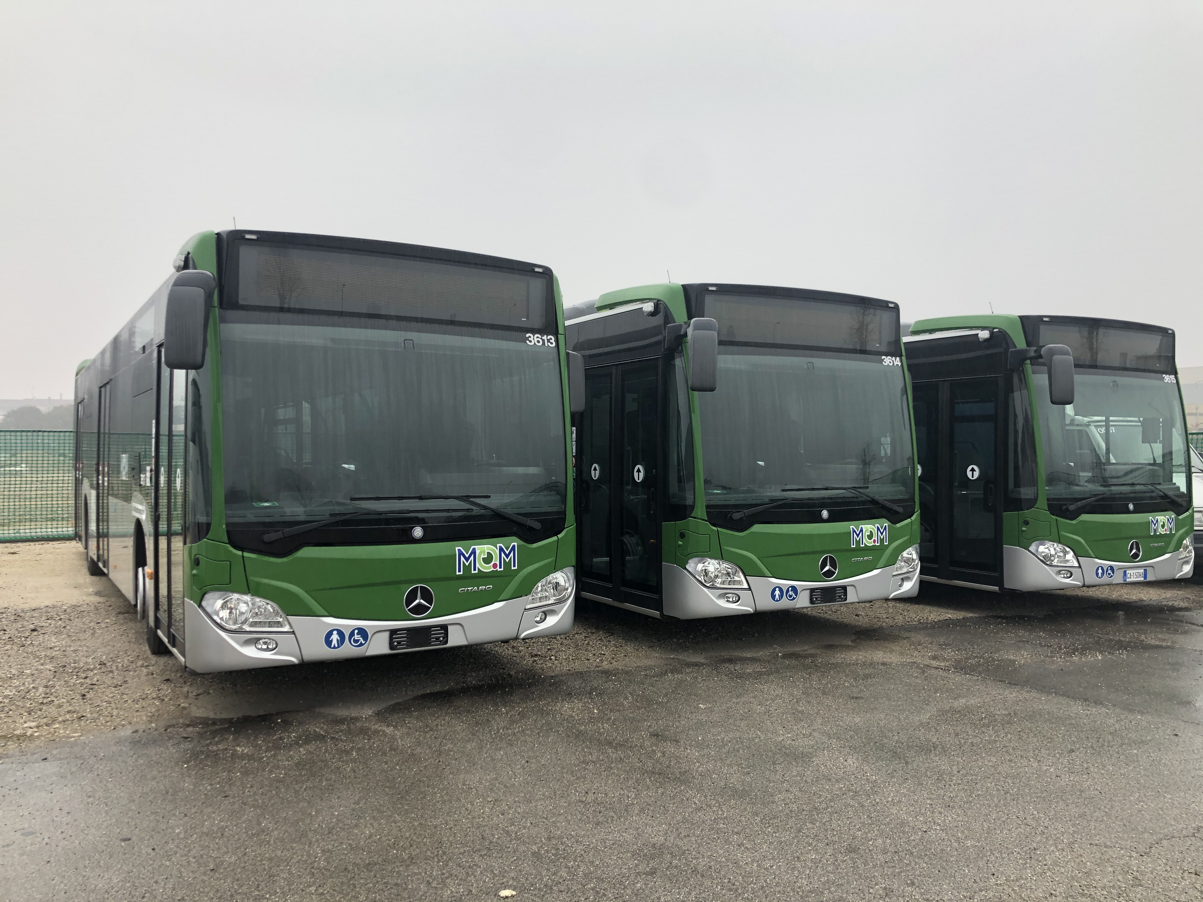 Mercedes Citaro 12 metri urbano